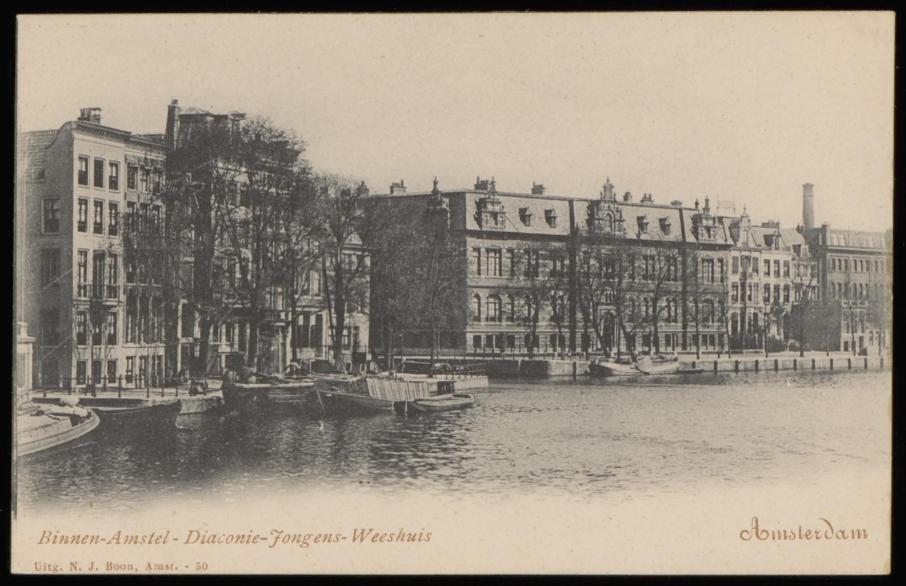 Beschrijving Binnen Amstel, geheel links de Groenburgwal en StaalkadeIn het midden Zwanenburgwal hoek Amstel 29 . Uitgave N.J. Boon, AmsterdamDocumenttype prentbriefkaartVervaardiger Boon, N.J. (uitgever)Collectie Collectie Stadsarchief Amsterdam: prentbriefkaartenDatering 1900 ca.Geografische naam Binnen AmstelAmstelInventarissen PBKD00250000003 Generated with Dememorixer